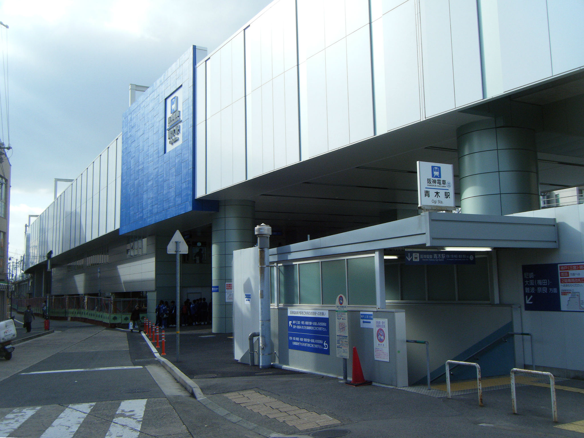 阪神青木駅 下り高架駅舎